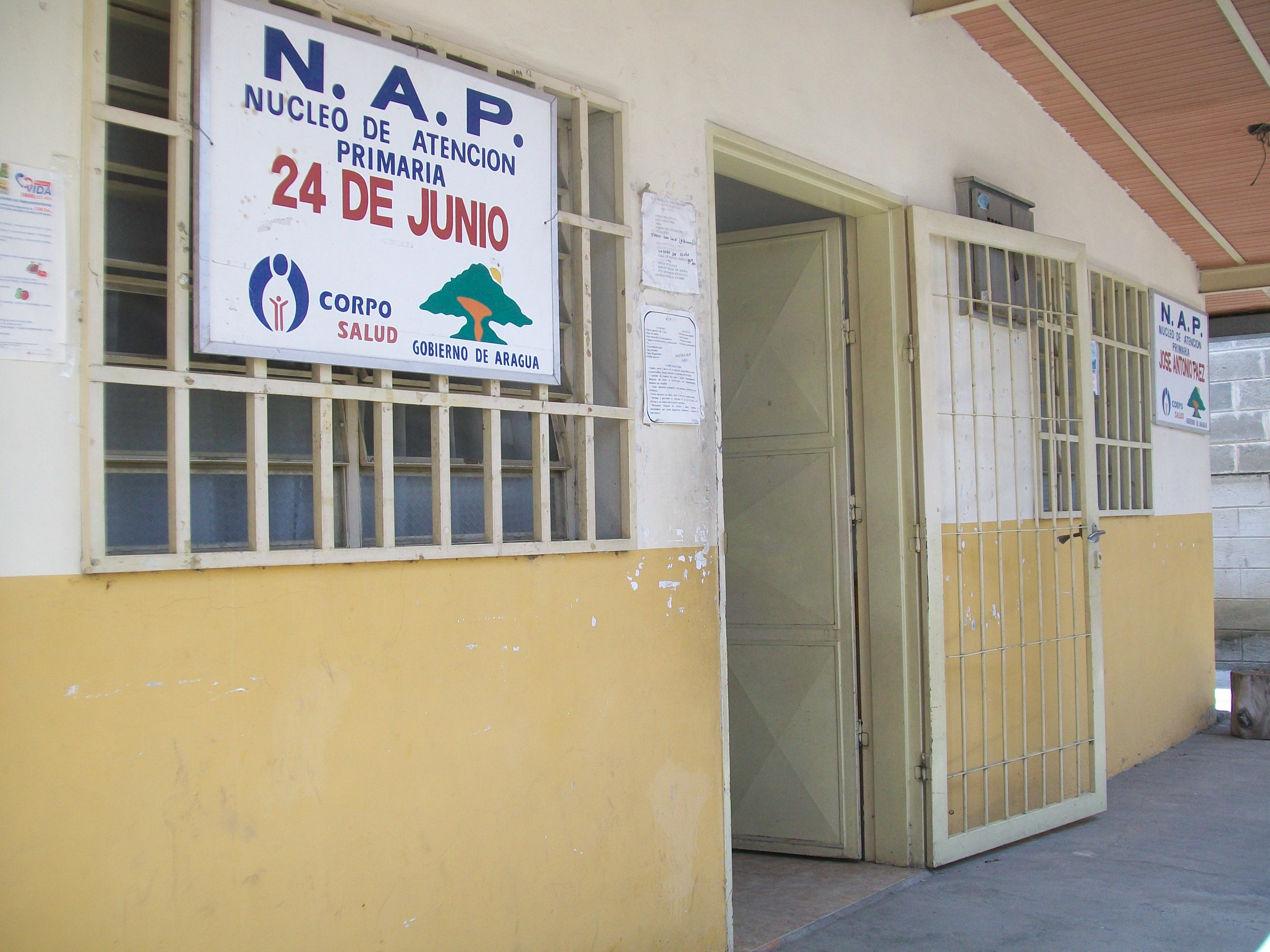 Núcleo de atención primaria de la Corporación de Salud del Estado Aragua, Venezuela